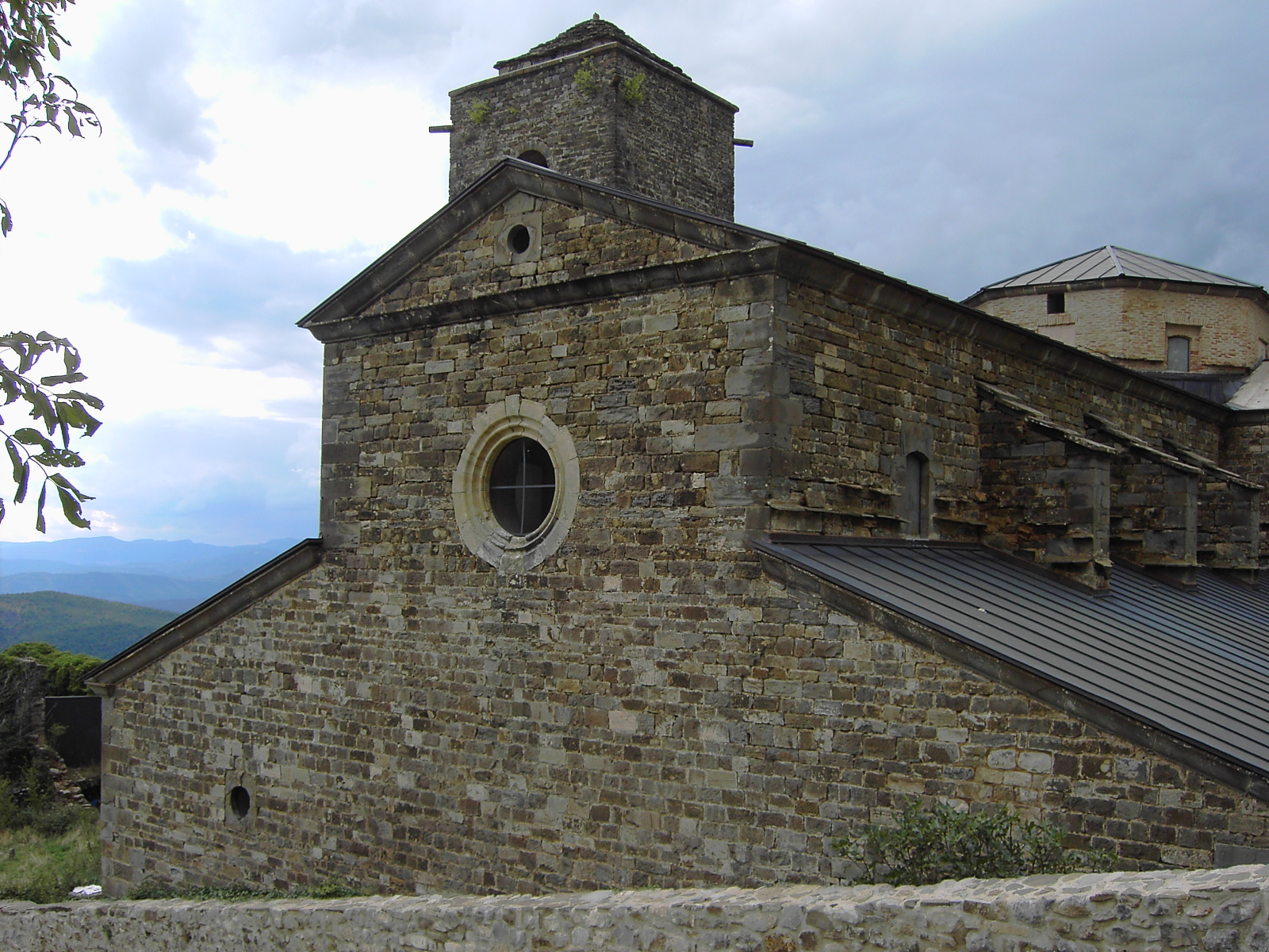 La fachada del Real Monasterio de San Veturián, en el municipio altoaragonés de El Pueyo de Araguás.